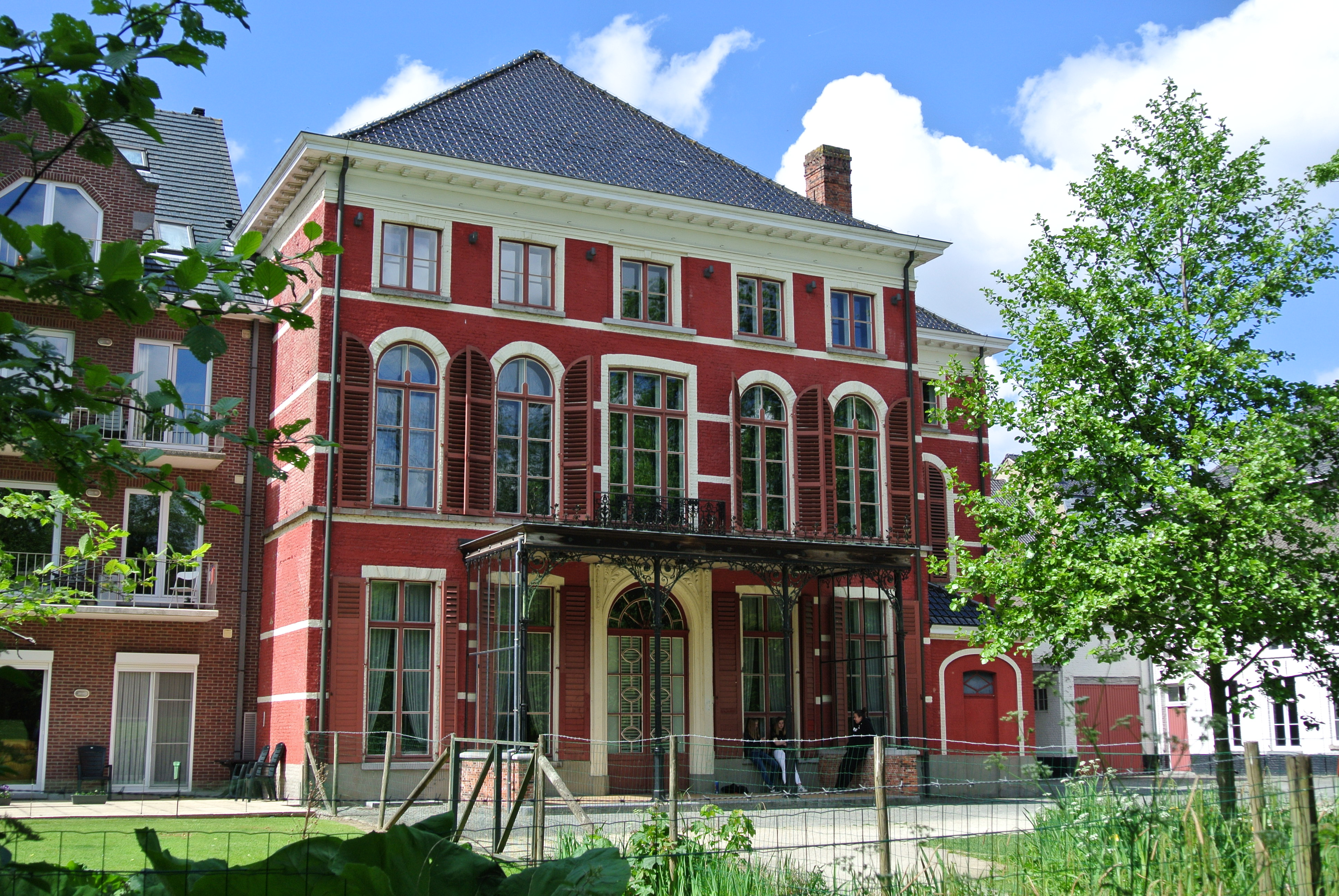 Huis Mulle de Terschueren, imposant laatclassicistisch herenhuis - Tielt